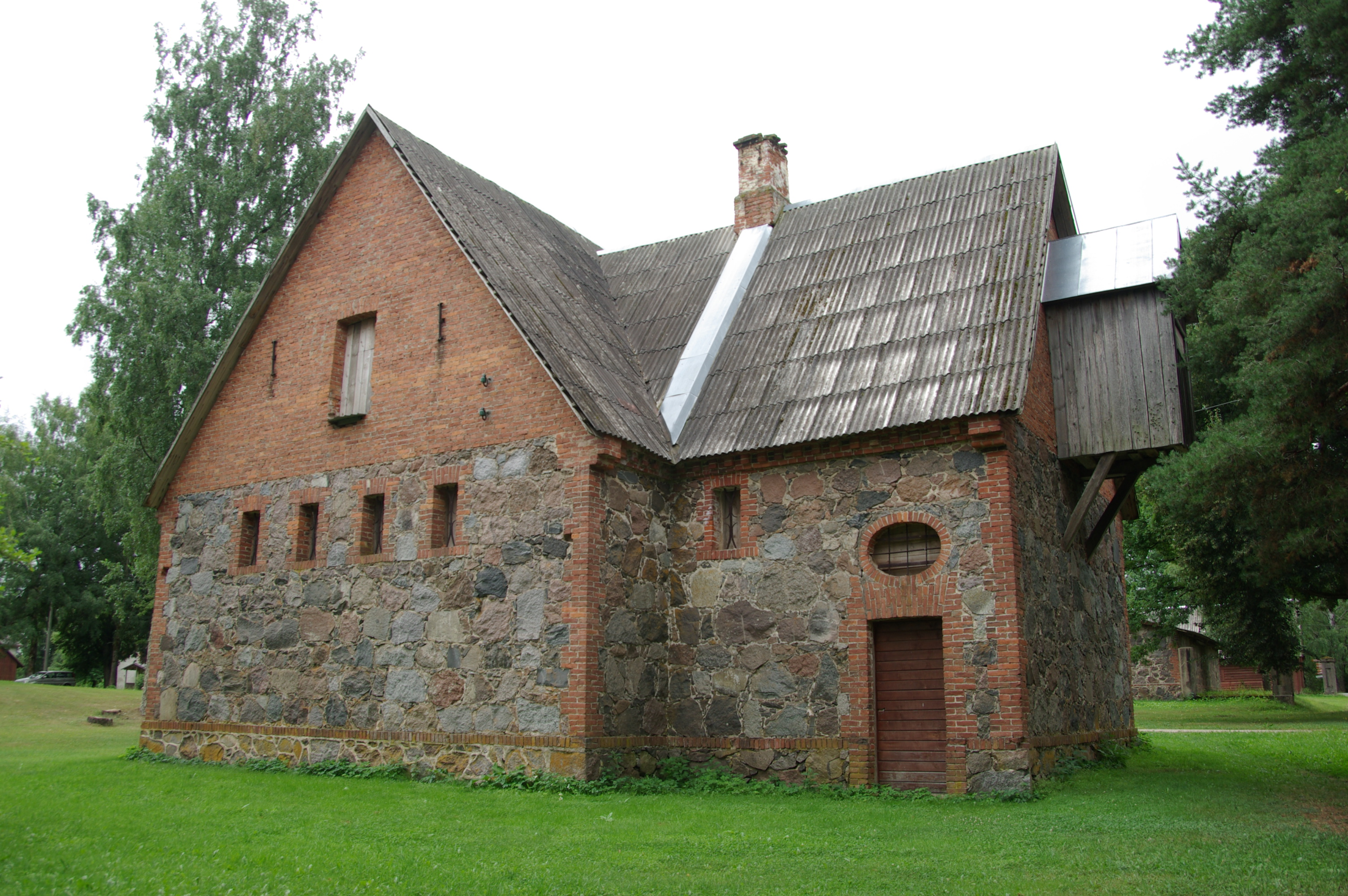 Põlva maakond, Räpina vald, Ruusa küla